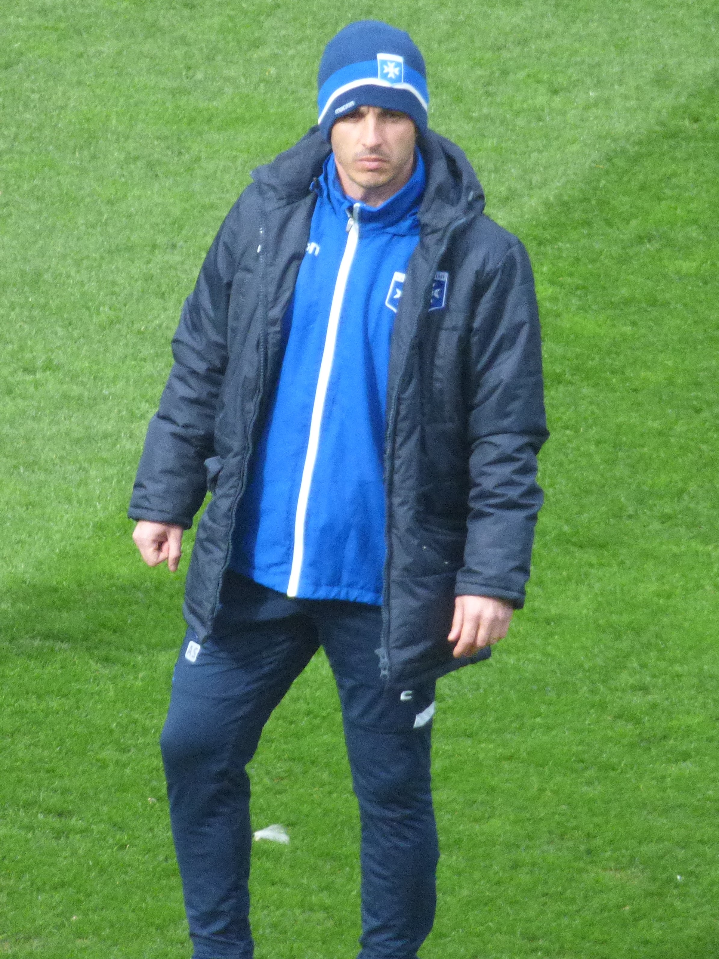 Adrian Sarkisian avant le match RC Lens - AJ Auxerre, comptant pour la 28ème journée du championnat de France de football de Ligue 2 2018-2019, le 9 mars 2019 au Stade Bollaert-Delelis.